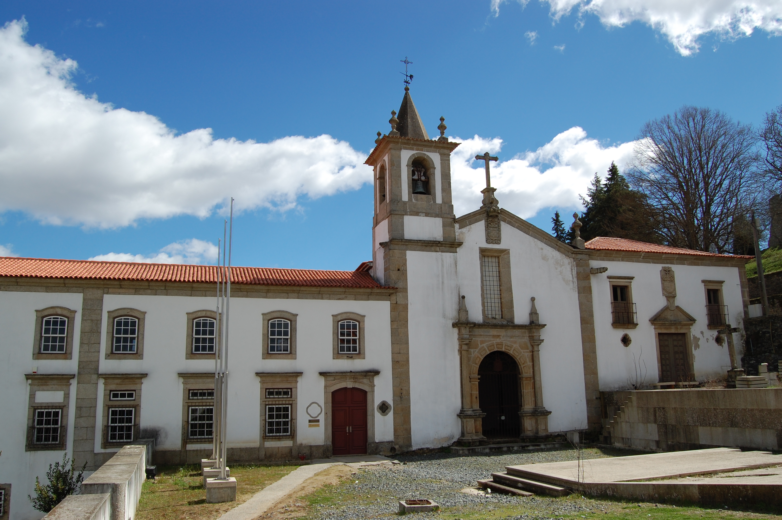 O Convento de São Francisco, hoje sede do Arquivo Distrital de Bragança, na cidade de Bragança, no nordeste de Portugal.